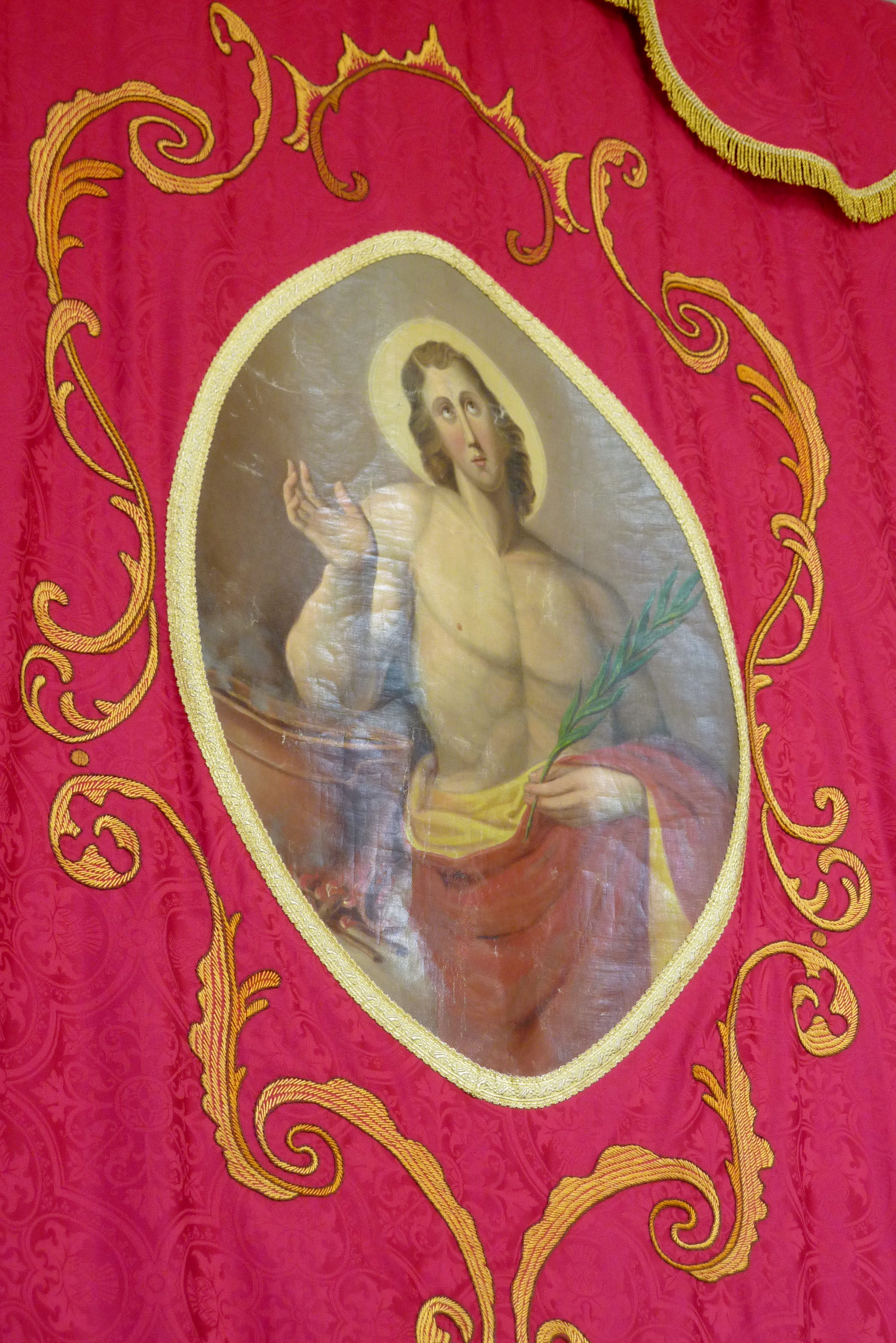 Katholische Filialkirche St. Veit in Veitriedhausen, einem Stadtteil von Lauingen im Landkreis Dillingen an der Donau (Bayern), Prozessionsfahne mit Darstellung des hl. Vitus (Veit)